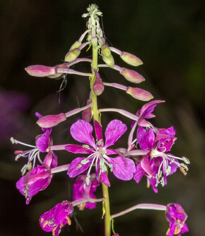 Sachsen, Waldrand, Nordseite: Wald-Weidenröschen